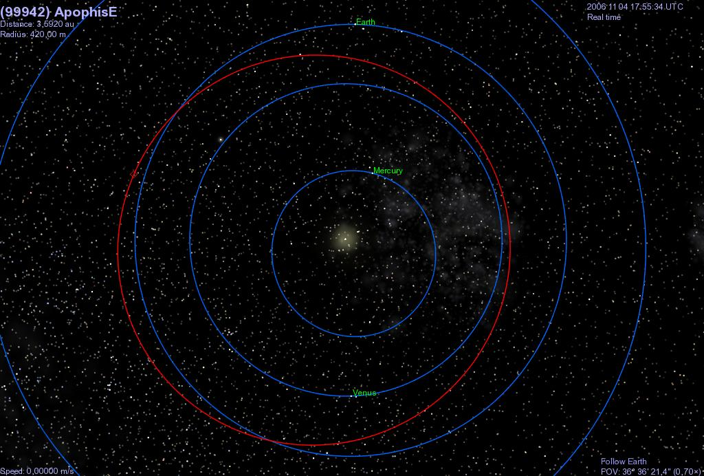 Orbita del asteroide Apophis en su encuentro con La Tierra 14 abr 2029 Generada con el programa Celestia (licencia GNU)